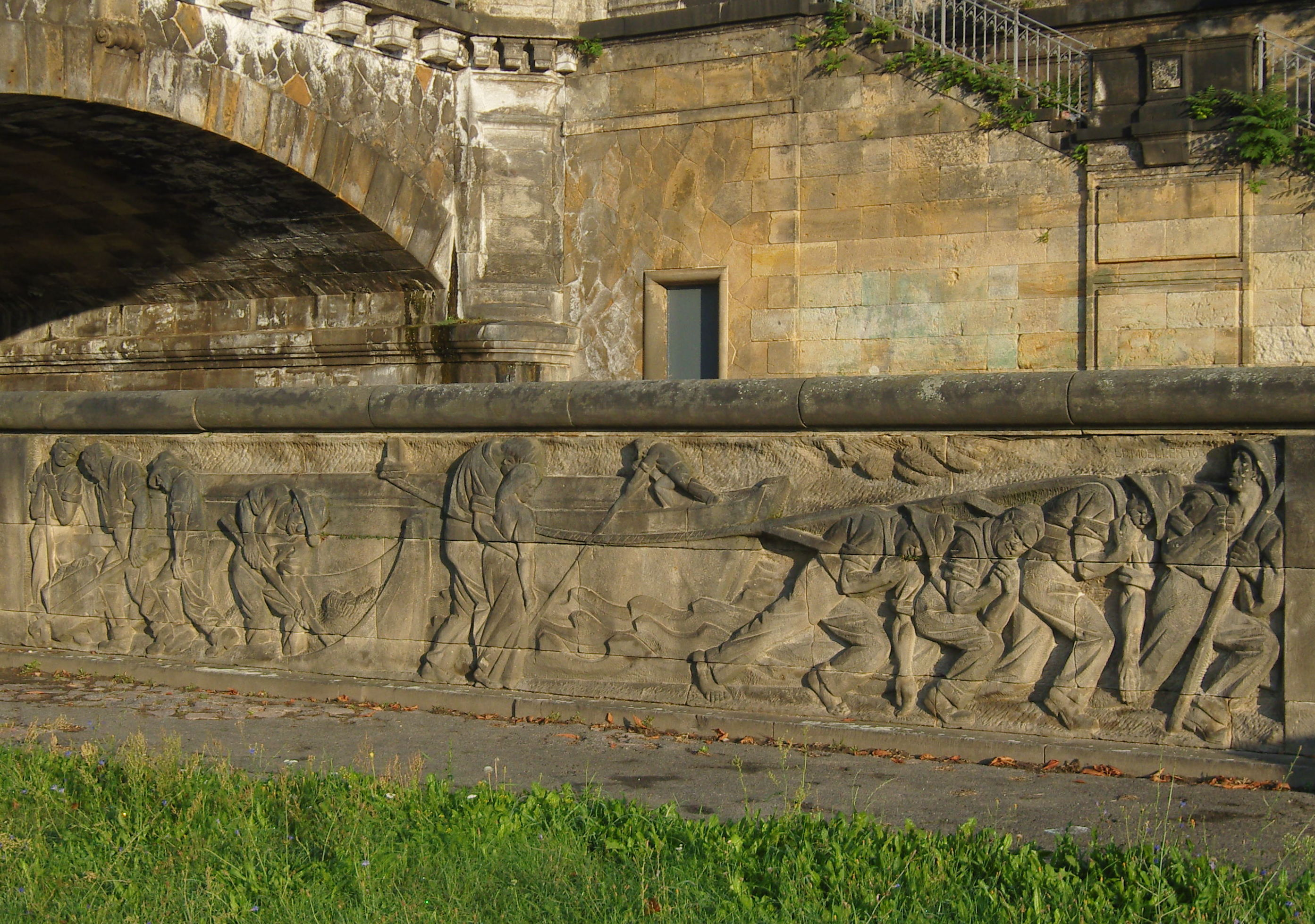 Relief unterhalb der Albertbrücke in Dresden, dargestellt sind Bomätscher, die Schiffe ziehen (auch Treidler genannt), geschaffen 1938 von Edmund Moeller.